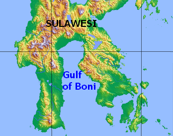 Cartina rappresentante il Golfo di Boni in Indonesia